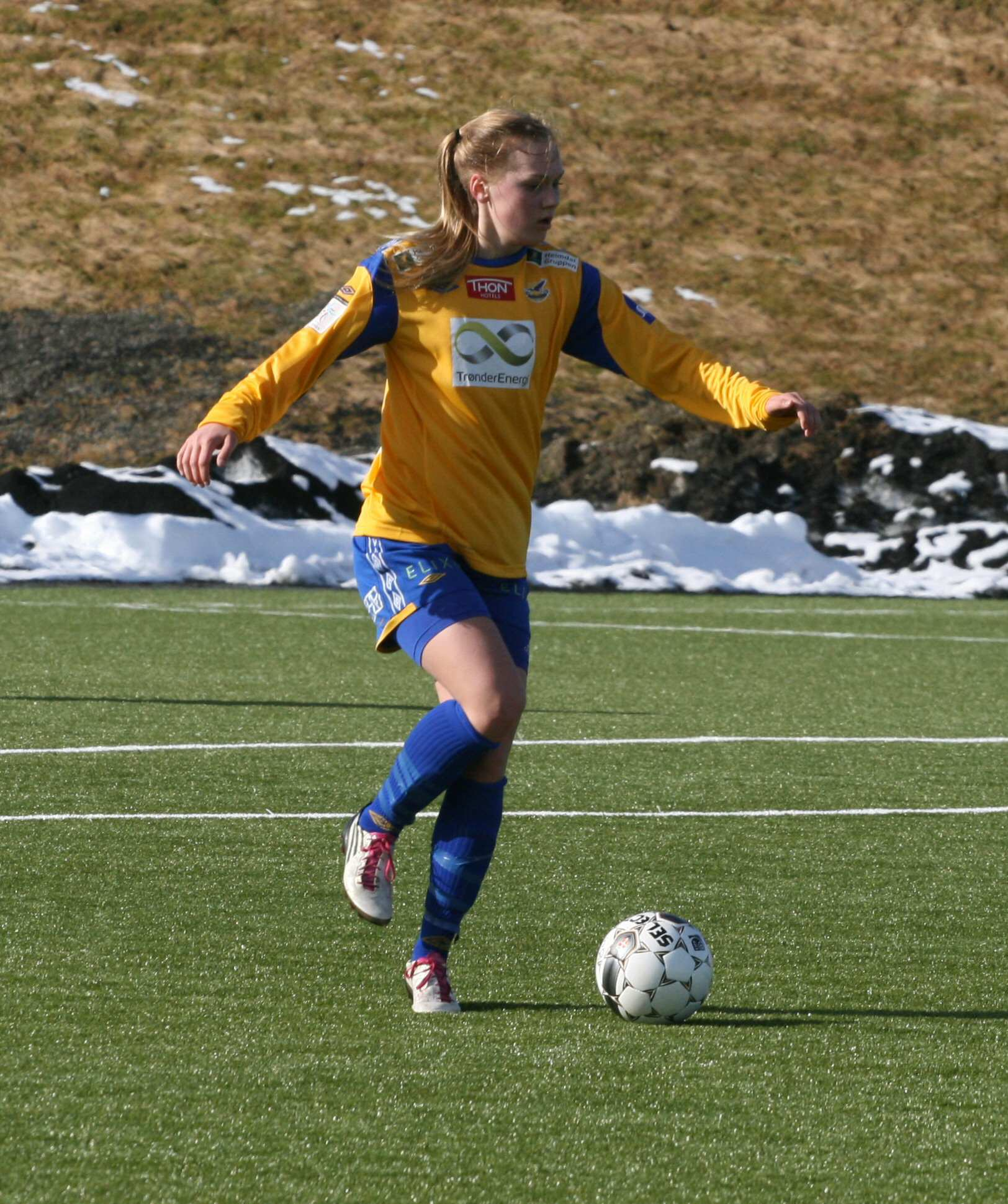 Fotballspilleren Marit Clausen